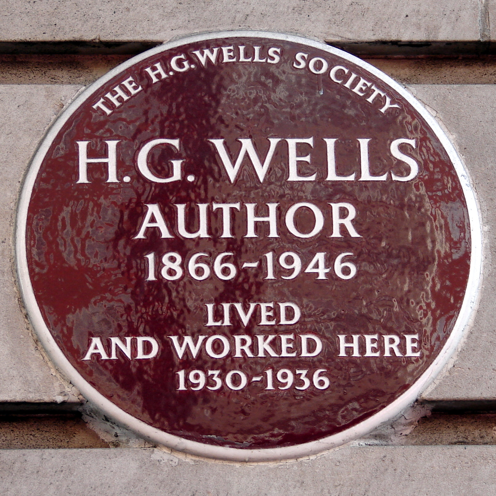 H. G. Wells